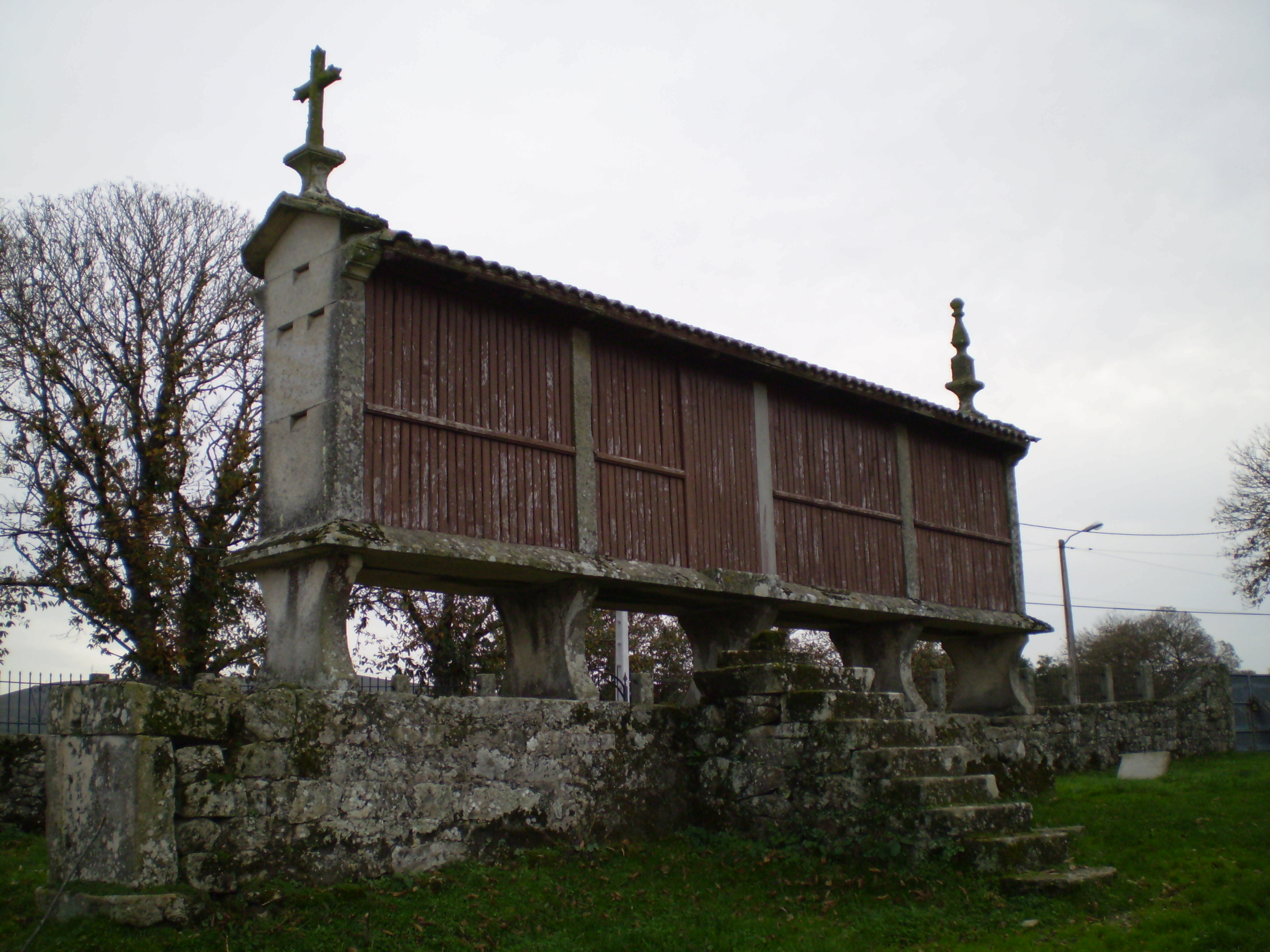 Hórredo da Casa de Xan en Nugallás (Antas de Ulla)